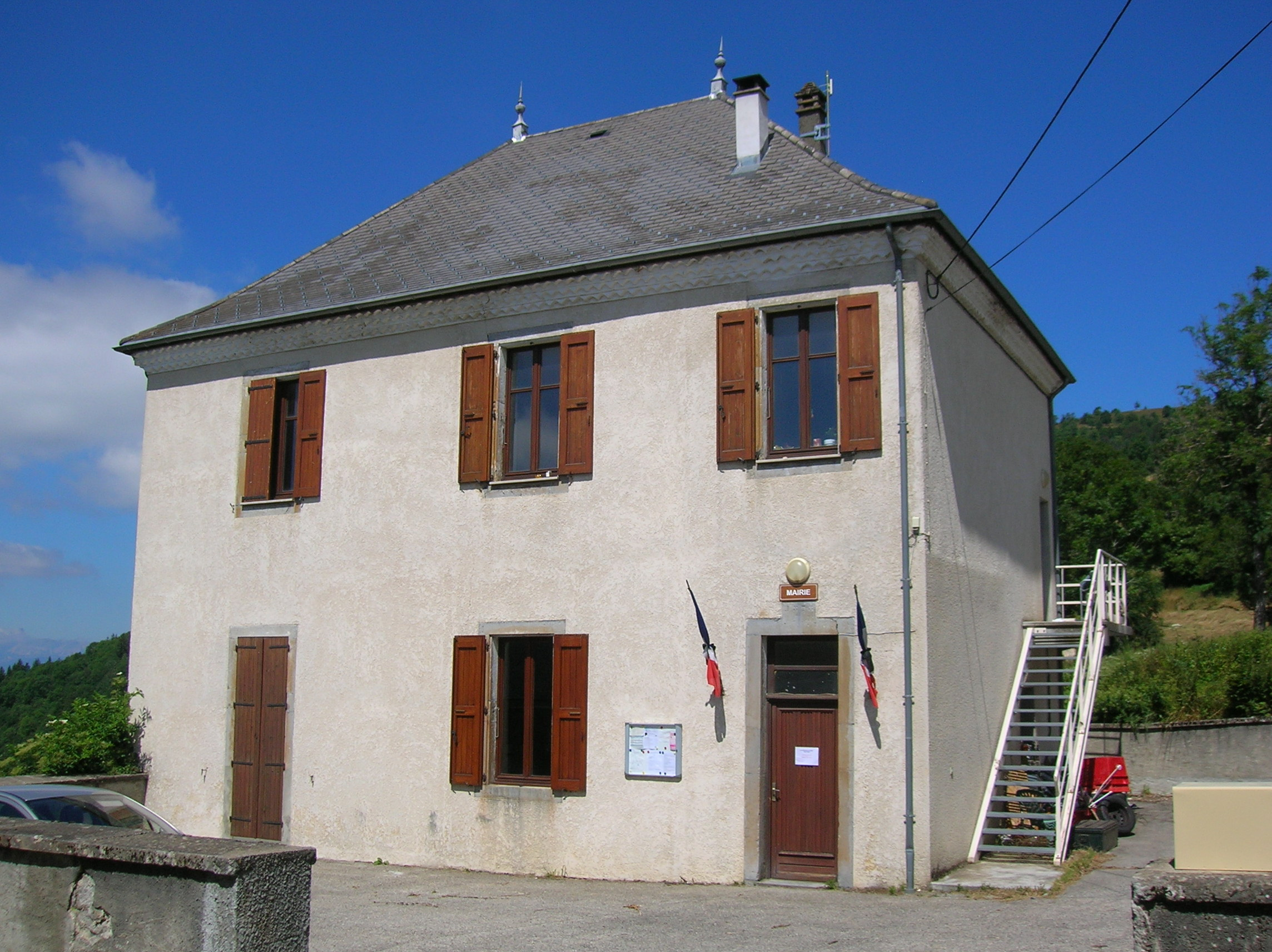 mairie de Saint-Michel-en-Beaumont, Isère, France.